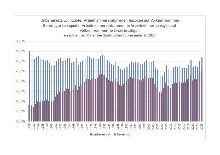 Lohnquote nach Daten des Statistisches Bundesamts. Tabelle 18 Verteilung des Volkseinkommens ab 1950, 21 Bevölkerung und Erwerbstätigkeit ab 1950, 1.8 Arbeitnehmerentgelt, Löhne und Gehälter (Inländer) ab 1970, 1.12 Bevölkerung und Erwerbsbeteiligung ab 1970